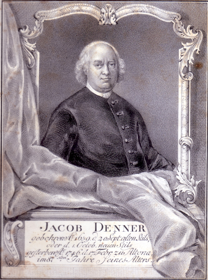 Jakob Denner, Mennonitenprediger